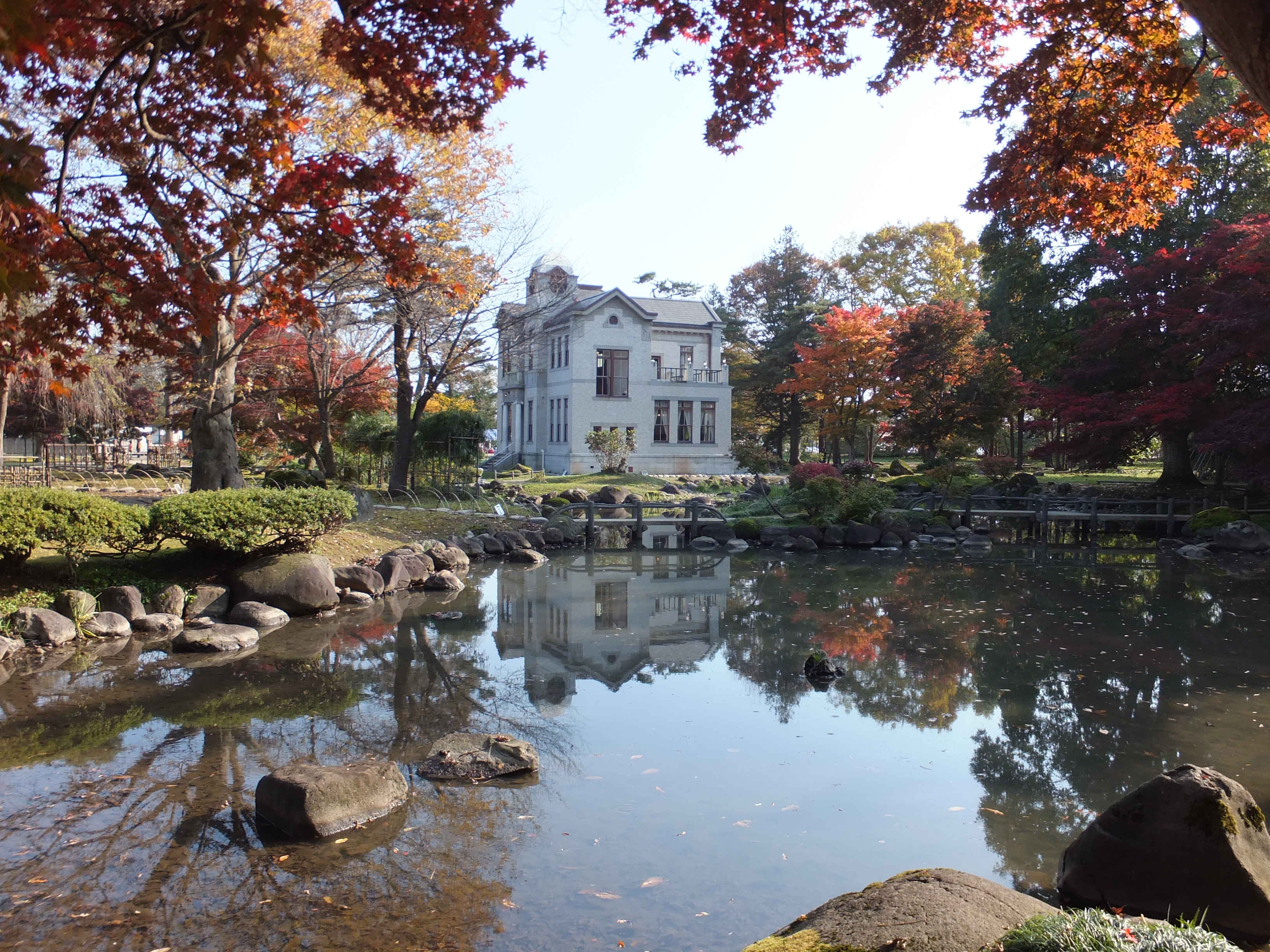 旧池田氏庭園内の池と洋館